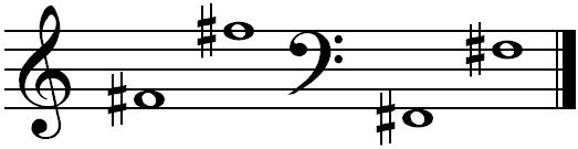 koobak